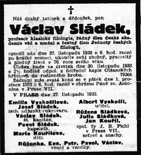 Václav Sládek, brother of J. V. Sládek, death announcement